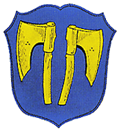 Wappen der Herren von Sturmfeder, niederer Adel in Rheinhessen und Württemberg